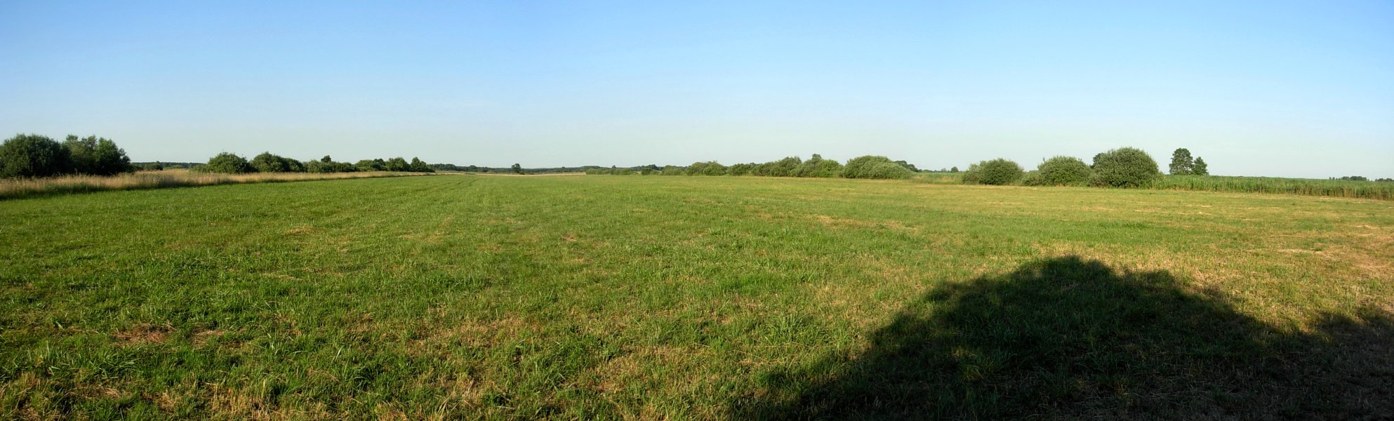 Bydgoskie Łąki Nadnoteckie